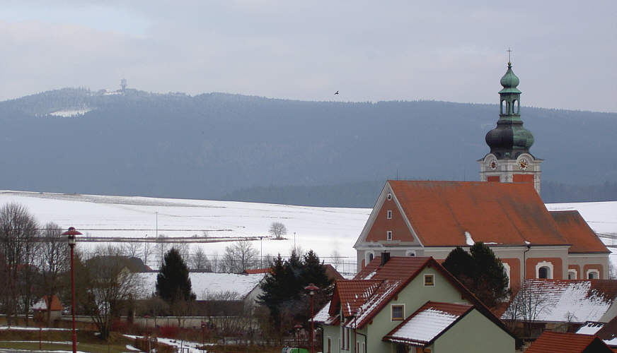 Neualbenreuth mit dem Tillenberg, dessen Gipfel auf tschechischer Seite liegt. Dieser wurde in der k.k. Monarchie als Mittelpunkt Europas errechnet. Fotograf: Walter J. Pilsak, Waldsassen Copyright Status: GNU Freie Dokumentationslizenz